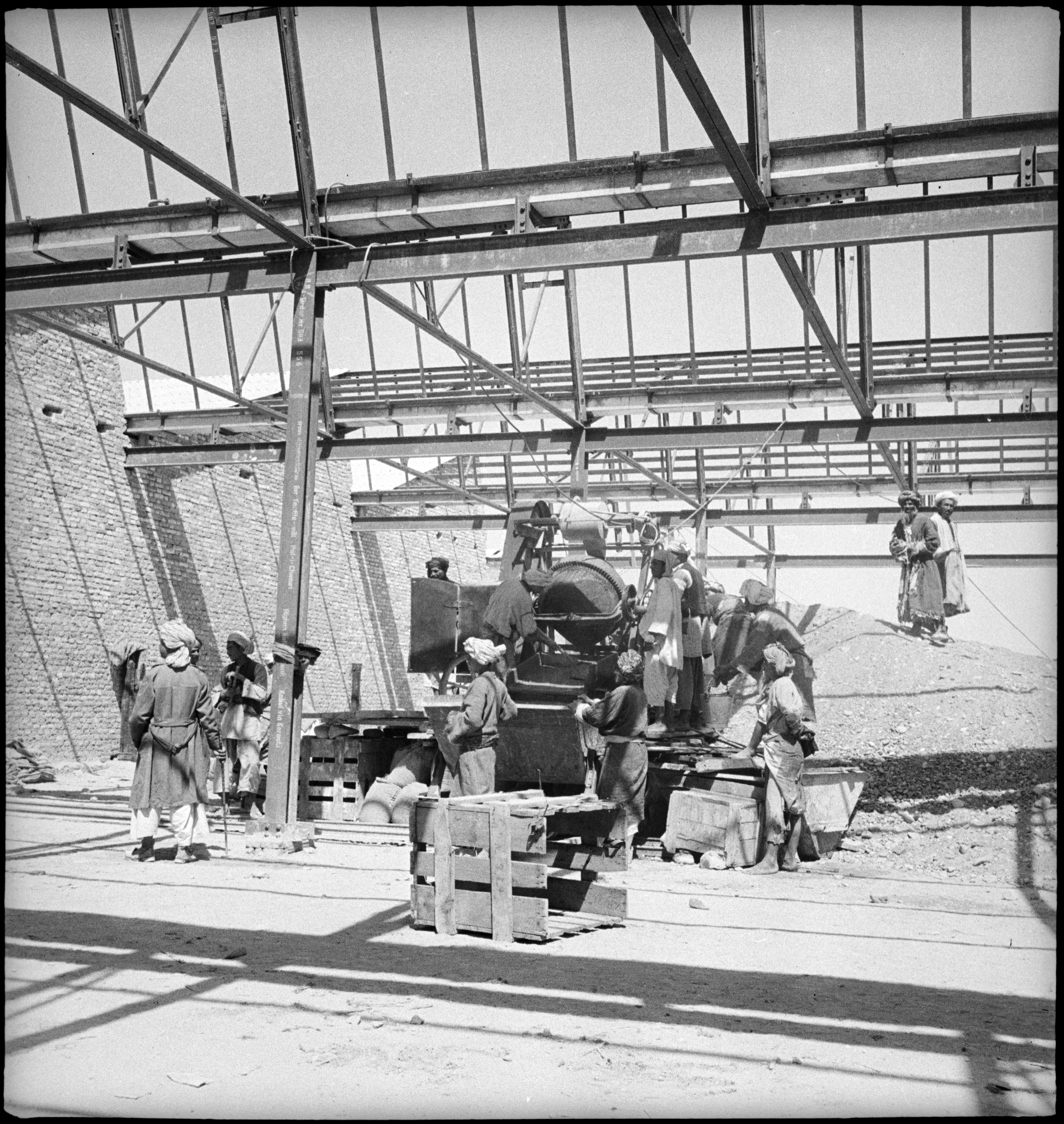 Afghanistan, Pol-i-Khomri (Puli Khumri, Pul-i-Kumri): Menschen; Männer beim Arbeiten an einem Gerüst